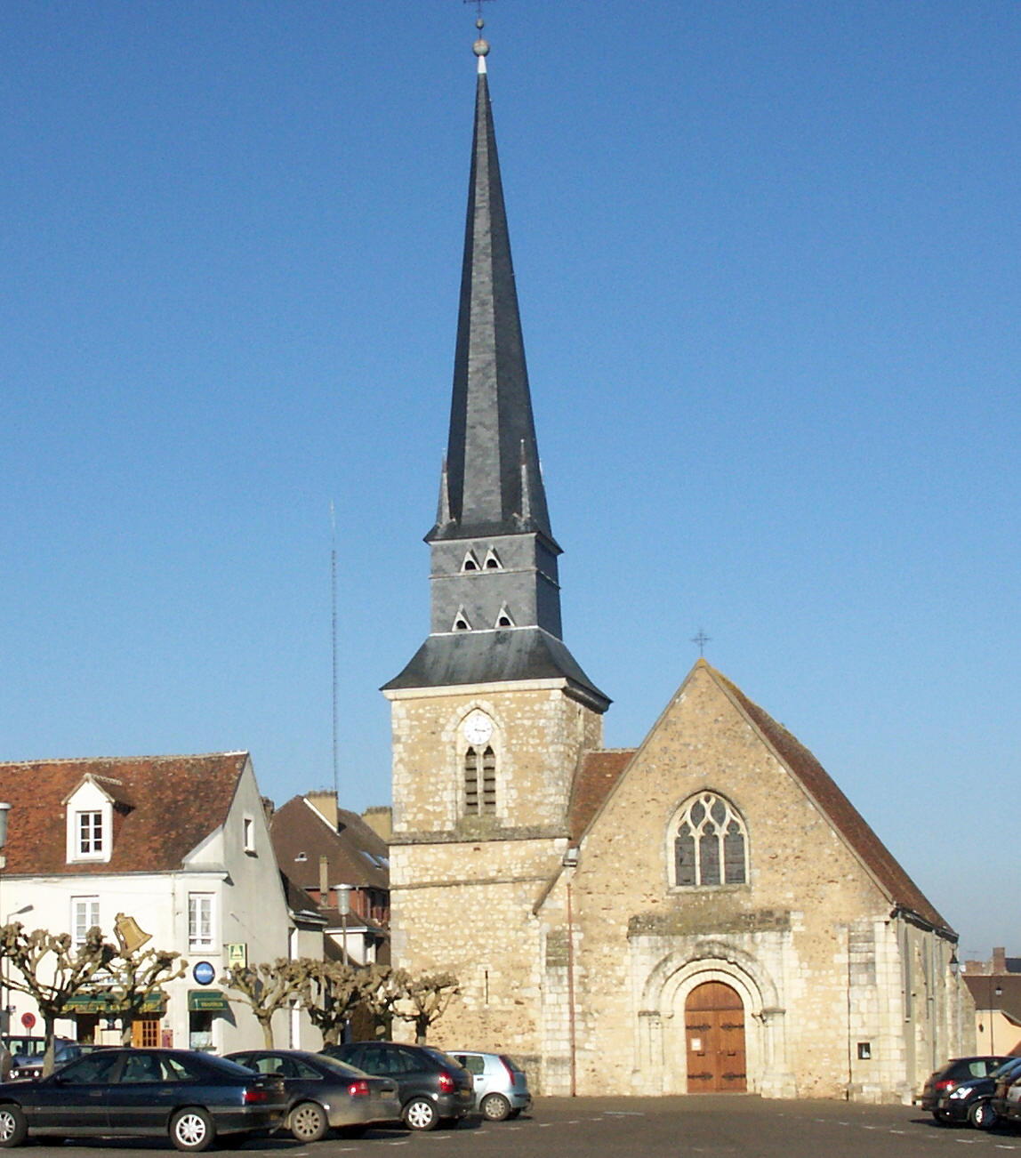 Construite au 15e s sur les ruines d’une église détruite par la guerre de Cent ans. Nef avec bas-côtés, tour-clocher fortifiée accolée au nord de la façade occidentale. Remaniée au 19e s. ISMH 1975 .